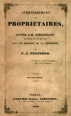 Avertissement aux propriétaires, ou lettre à M. Considérant, rédacteur de la Phalange - Pierre-Joseph Proudhon - éditions de 1848.